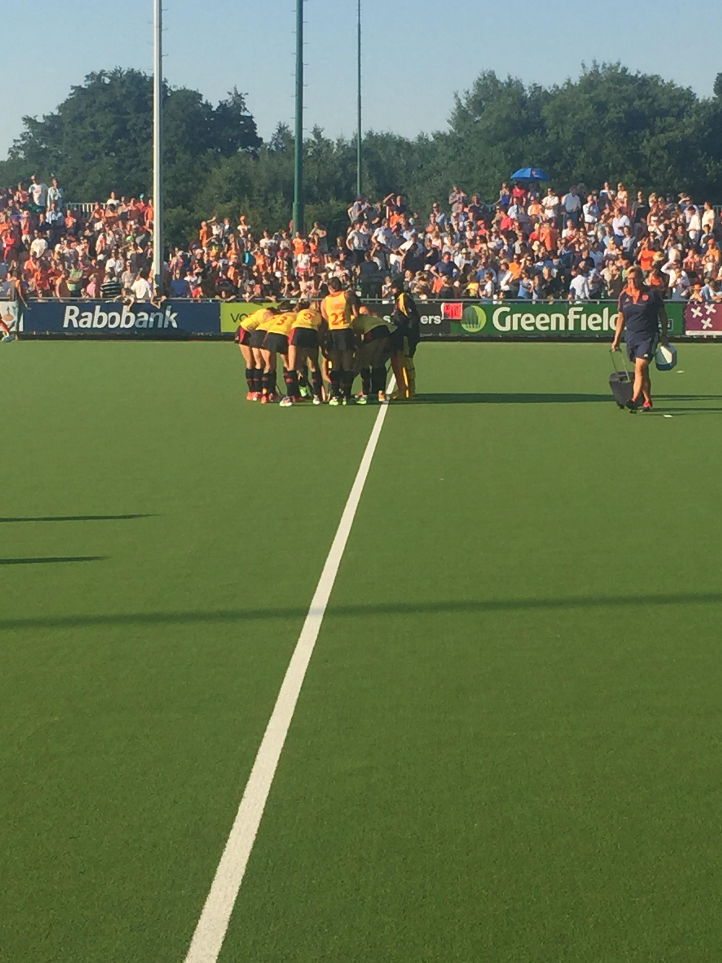 2016 Women's field hockey interland NED-ESP Women's field hockey interland NED-ESP Women's field hockey interland of the Netherlands against Spain on 20 July 2016 in Breda, the Netherlands. Part of the Rabo Super Serie Team the Netherlands: 1 Joyce Sombroek 2 Frederique Derkx 3 Xan de Waard 4 Kitty van Male 6 Laurien Leurink 7 Willemijn Bos 8 Marloes Keetels 9 Carlien Dirkse van den Heuvel 10 Kelly Jonker 11 Maria Verschoor 12 Lidewij Welten 13 Caia van Maasakker 14 Jacky Schoenaker 16 Michelle van der Pols 17 Maartje Paumen 18 Naomi van As 19 Ellen Hoog 20 Laura Nunnink 21 Lauren Stam 22 Larissa Meijer 23 Margot van Geffen 24 Eva de Goede 29 Maartje Krekelaar 20 Anne Veenendaal